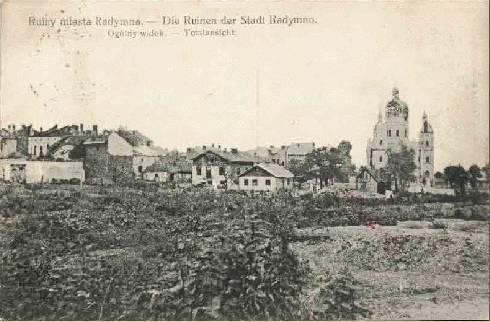 Pocztówka. Ruiny miasta Radymna.